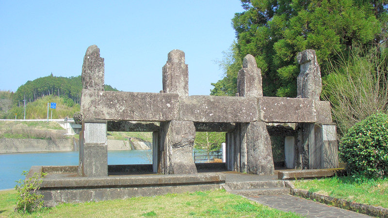 百太郎堰旧樋門 撮影者/著者/著作権保有者 : MK Products (本人がアップロード) 撮影日 : 2007/03/30 新鶴羽駅用にアップロードした画像です。良い画像があれば別の画像に変えてください。